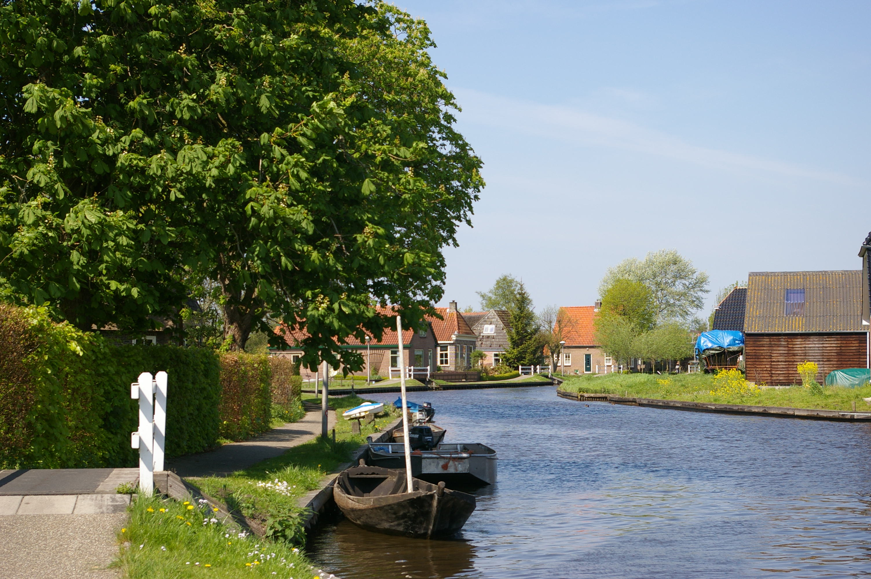 Kalenberg, municipality of Steenwijkerland, Overijssel, the Netherlands